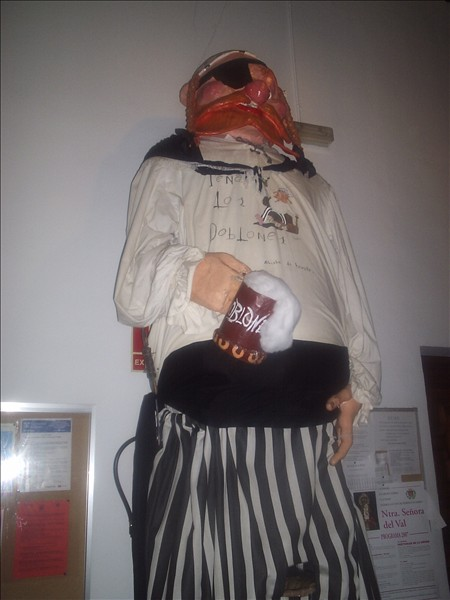 Gigantes de Alcalá de Henares